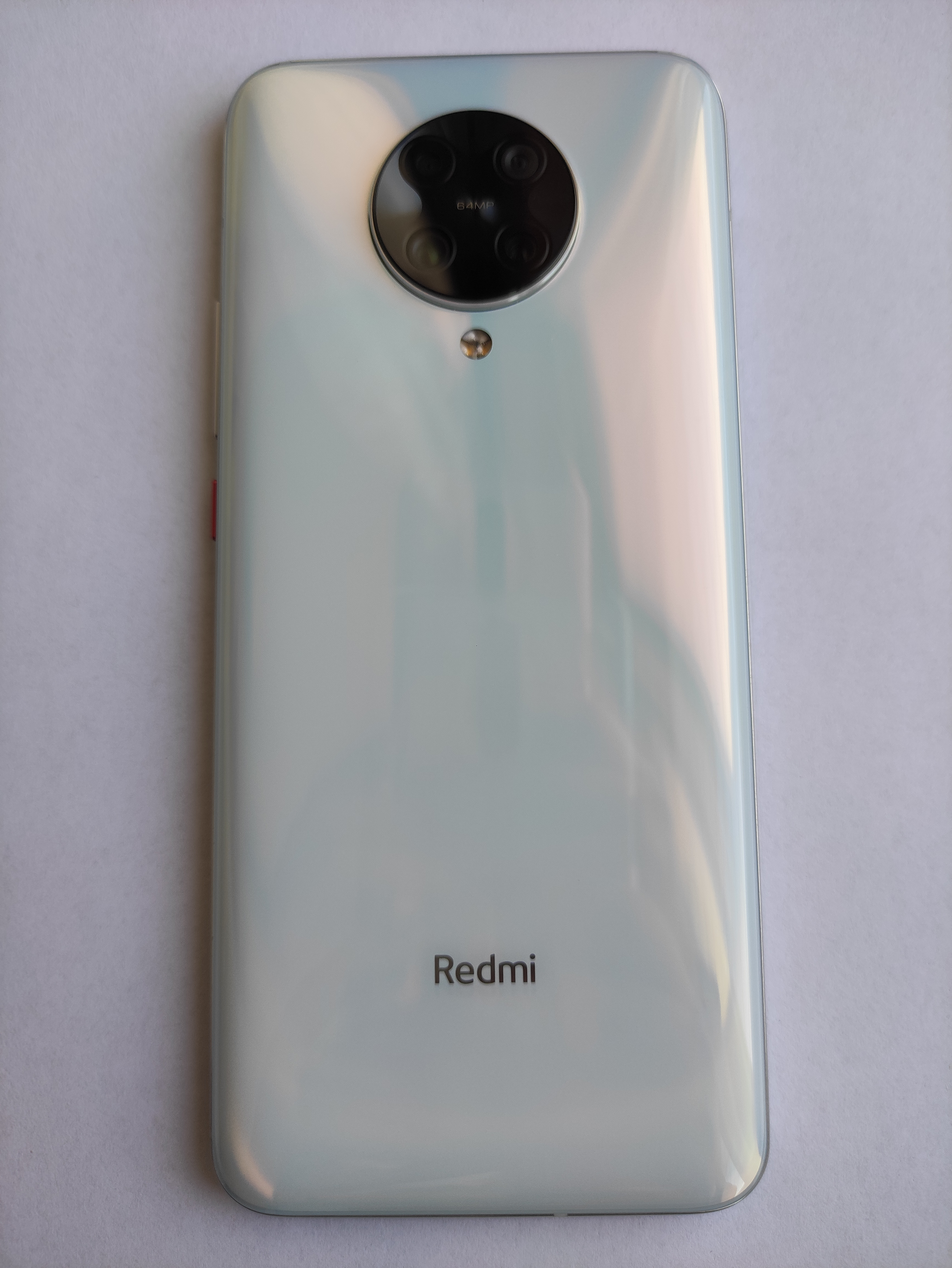 中文（中国大陆）: Redmi K30 Pro的机身背部